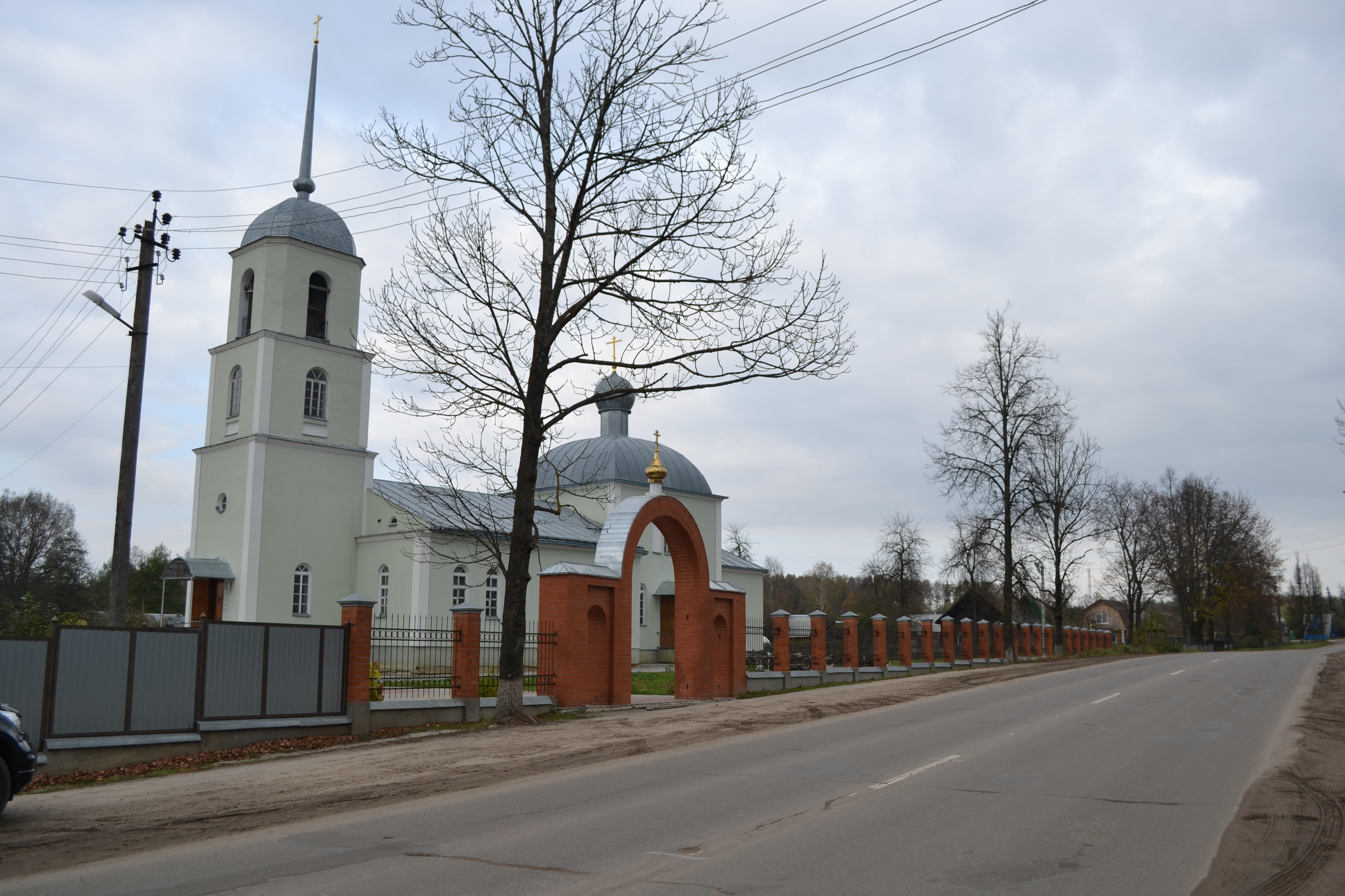 Церковь села Думиничи